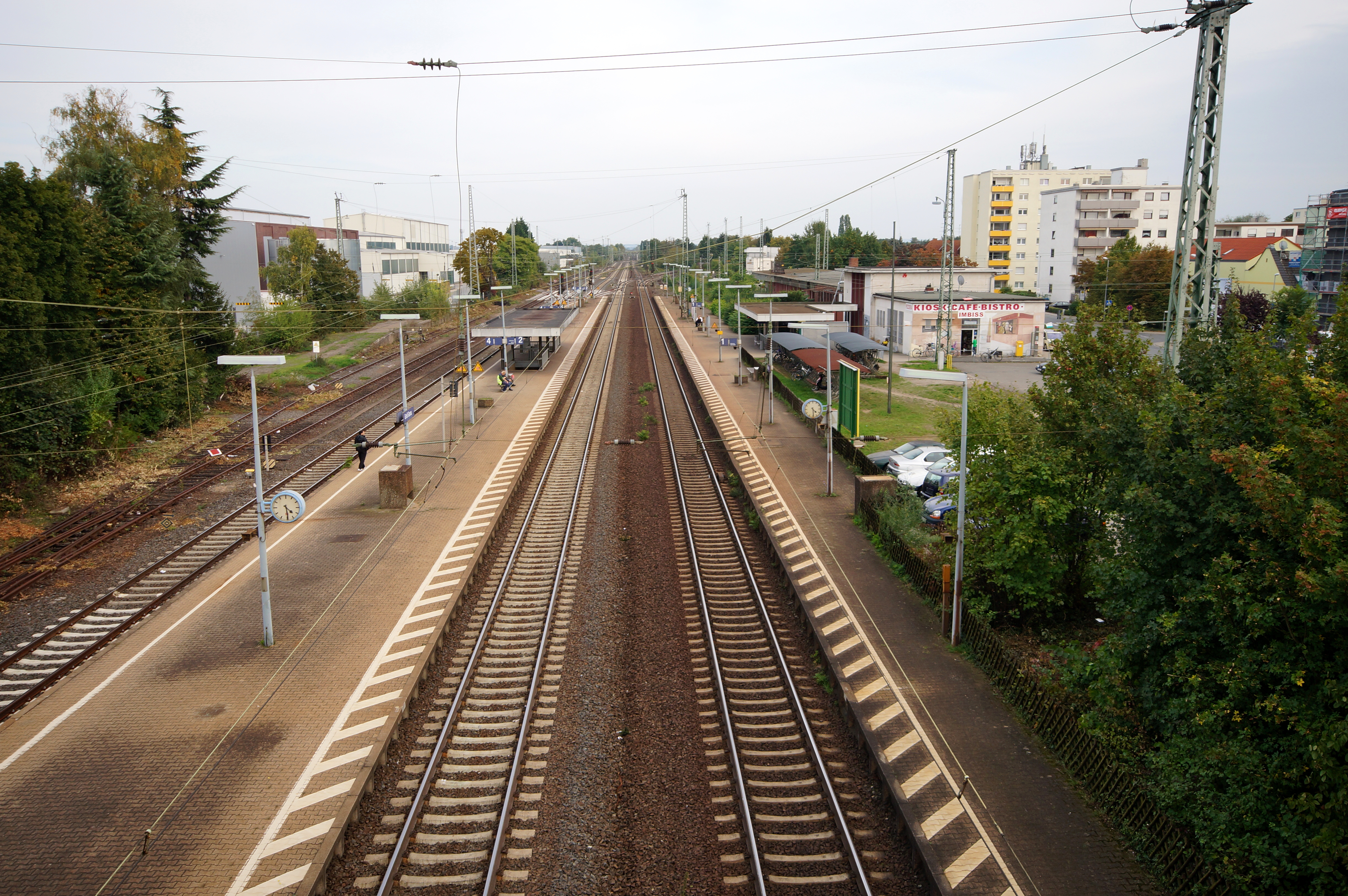 Der Bahnhof Groß Gerau von Groß-Gerau, Blickrichtung Darmstadt